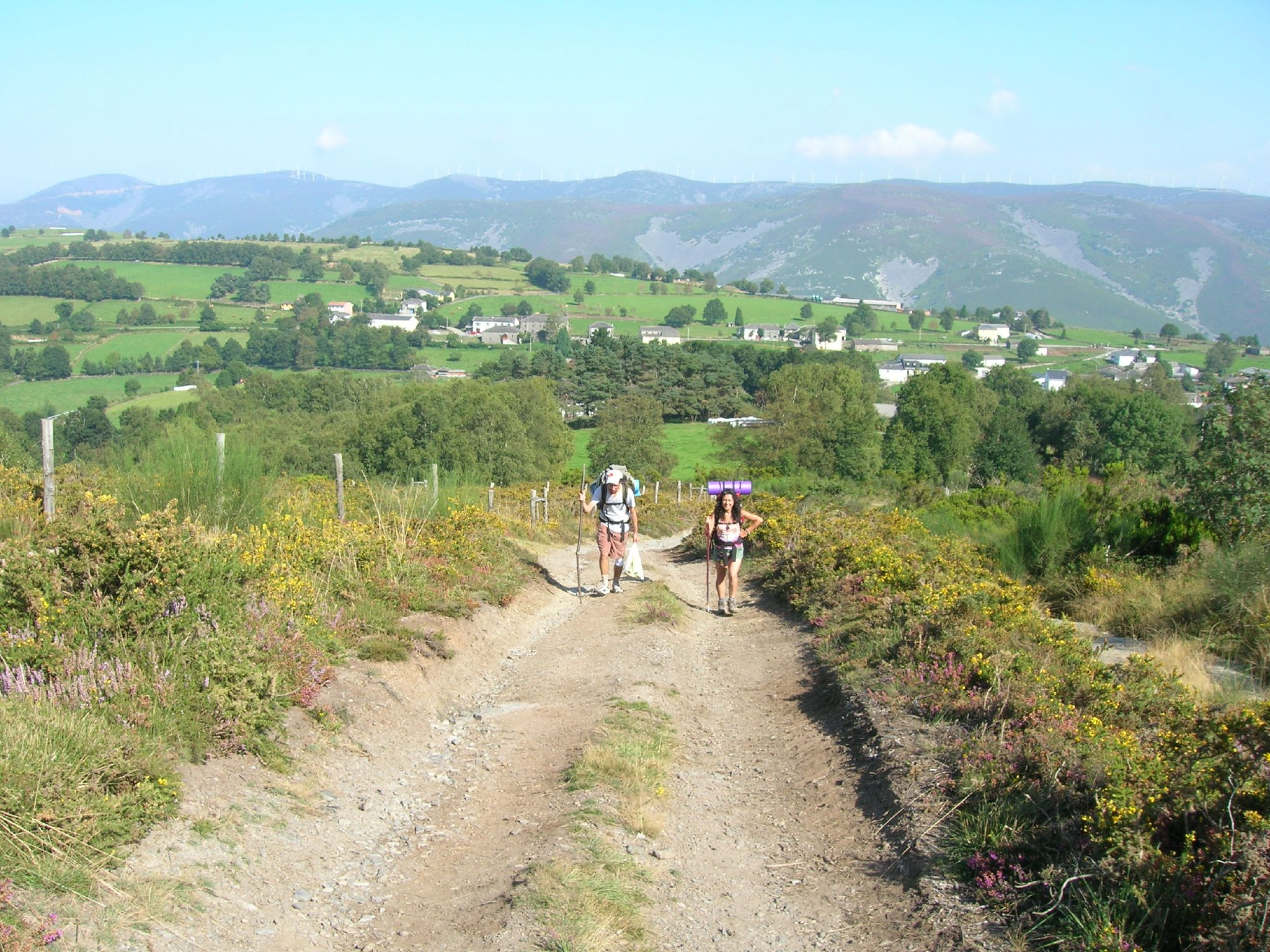 Saliendo de Berducedo hacia La Mesa.